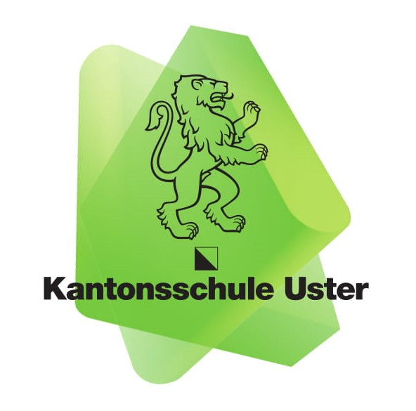 Das Buch, der Zürcher Wappenlöwe, das Zürcher Wappen und der Schriftzug bilden das Logo der Kantonsschule Uster